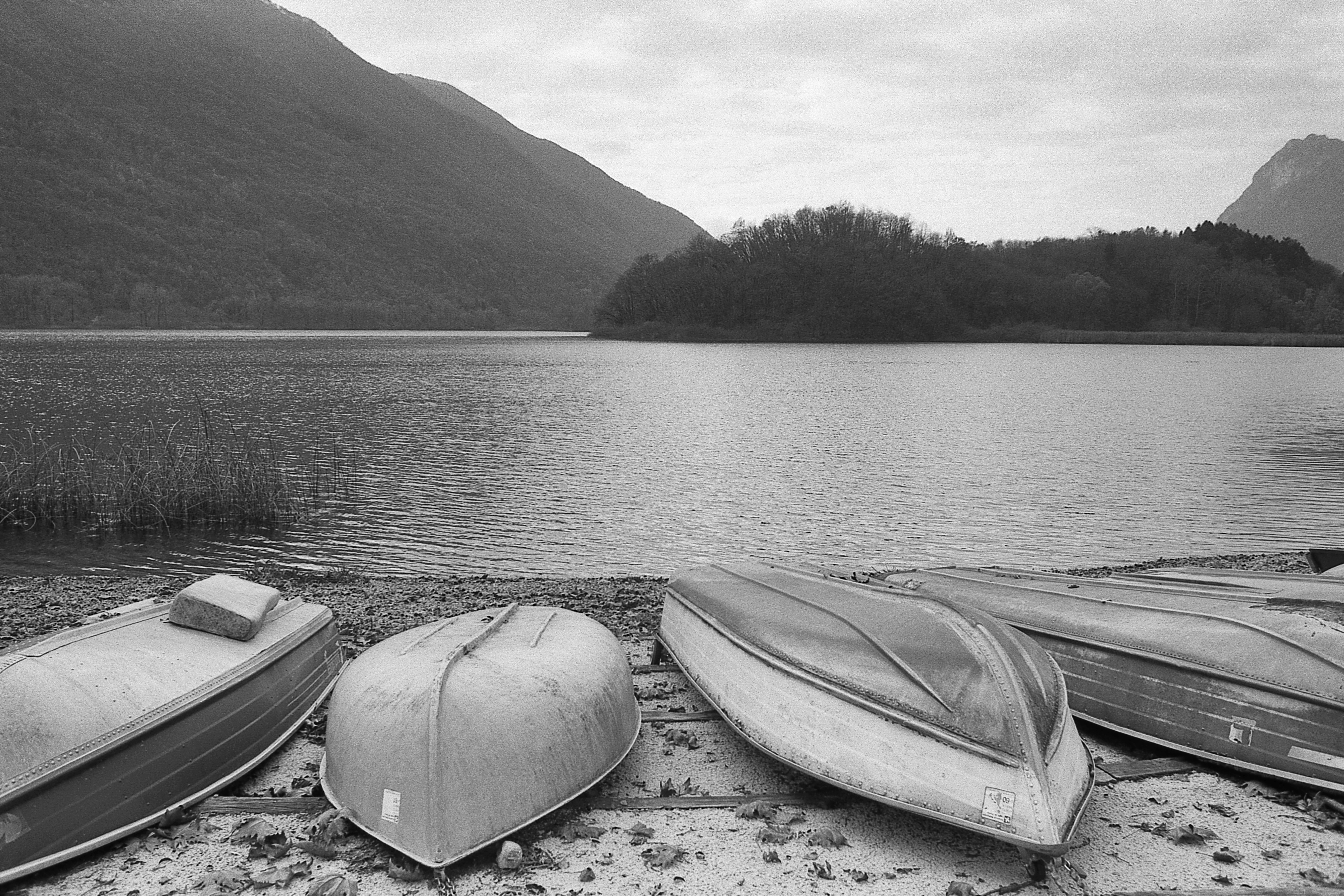 riserva naturale Lago di Piano (Q47487014)